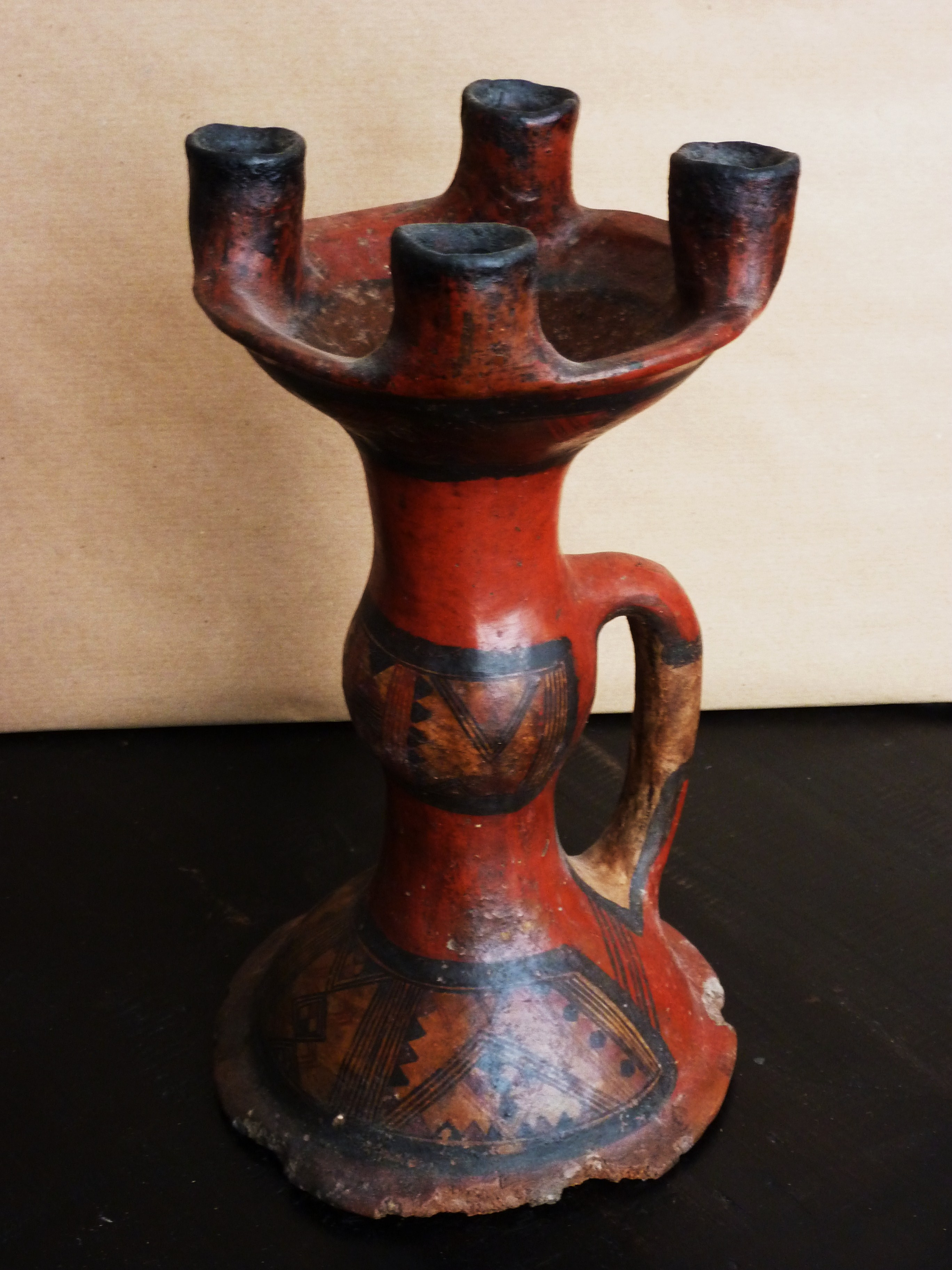 Lampe de Kabylie, Algérie, vers 1970